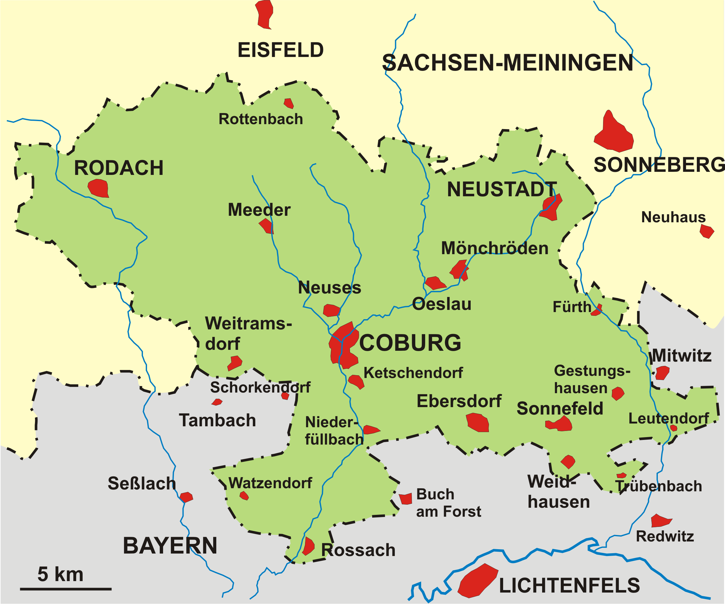 Karte des Herzogtum Sachsen-Coburg 1826-1918